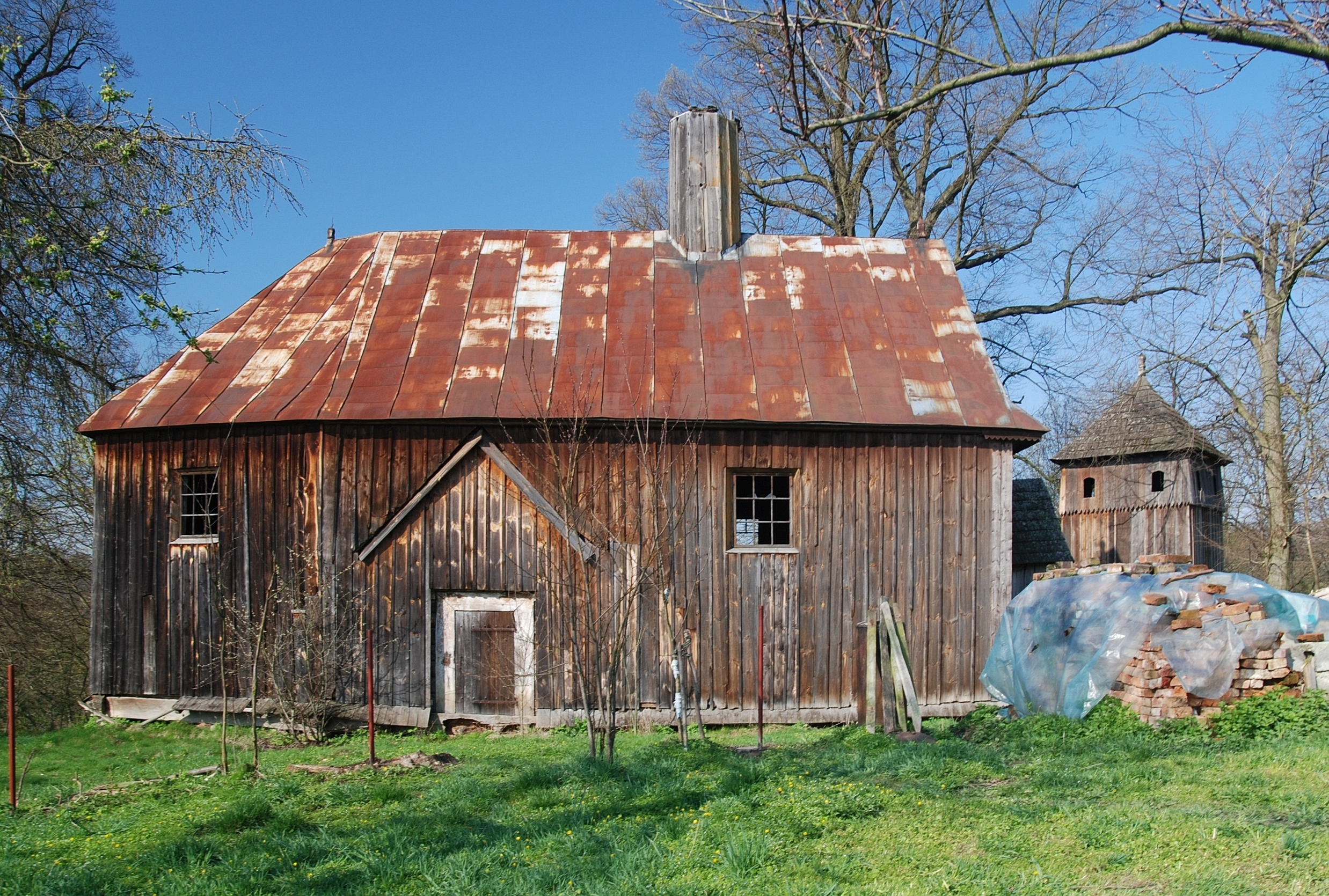 wieś Babice